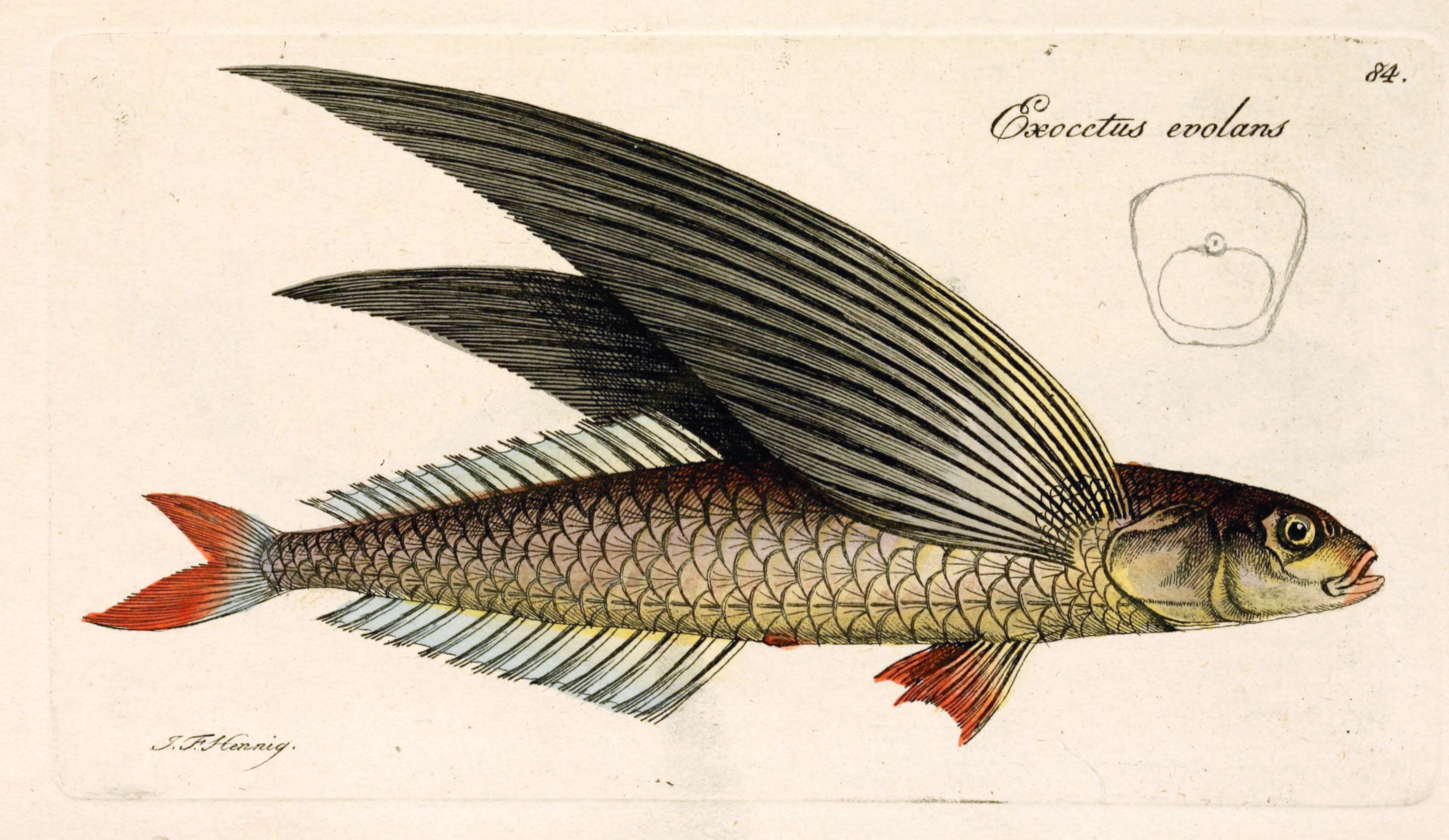 Exocoetus volitans syn. E. evolansM.E. Blochii ... Systema ichthyologiae iconibus CX illustratum v.2